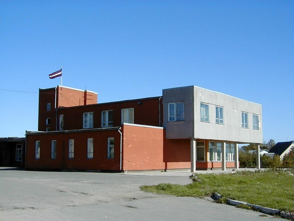 Usmas pagastmāja 2000-09-17